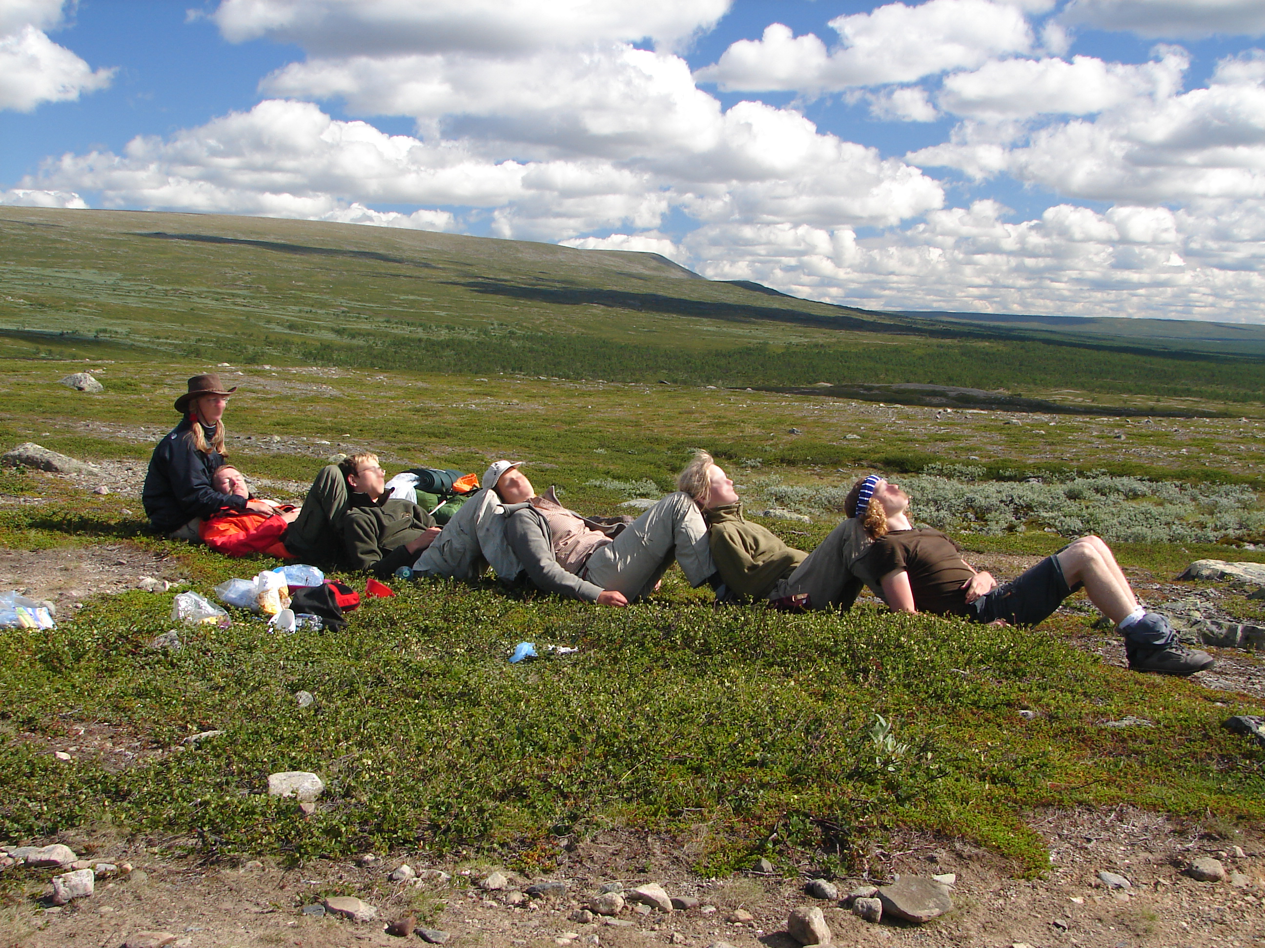 Gruppenreise: Wandern auf dem Kungsleden in Schwedisch Lappland